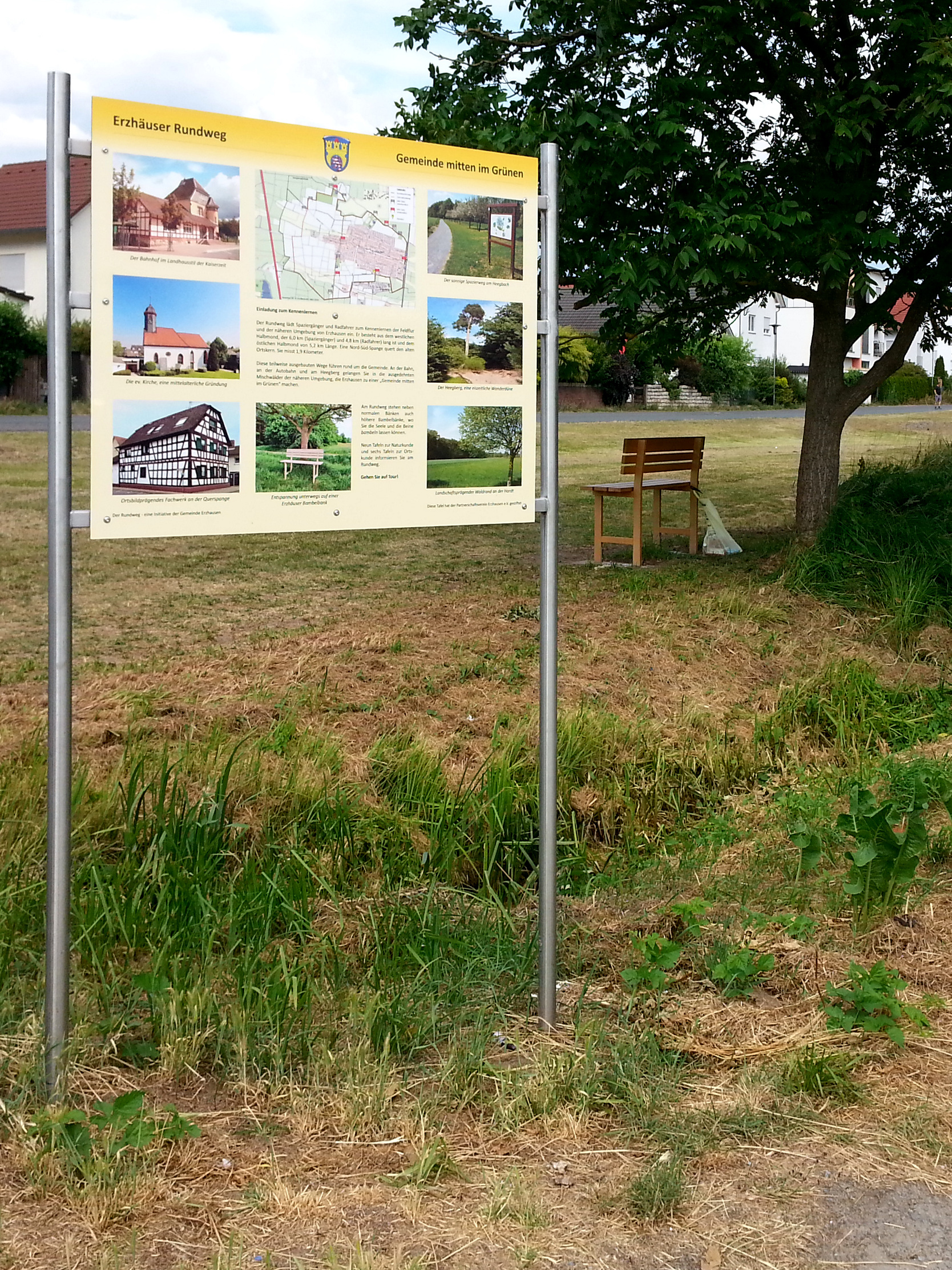 Informationstafel zum Erzhäuser Rundweg an der Ecke Annastraße/Am Hedrichsee in Erzhausen. Im Hintergrund ist eine der "Bambelbänke" zu sehen.